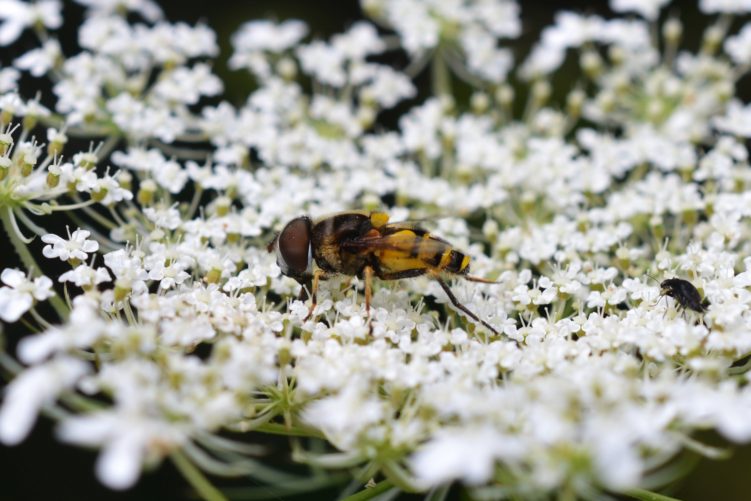 Rentschler Forest Metropark - Line Hill Mound, Fairfield, Ohio